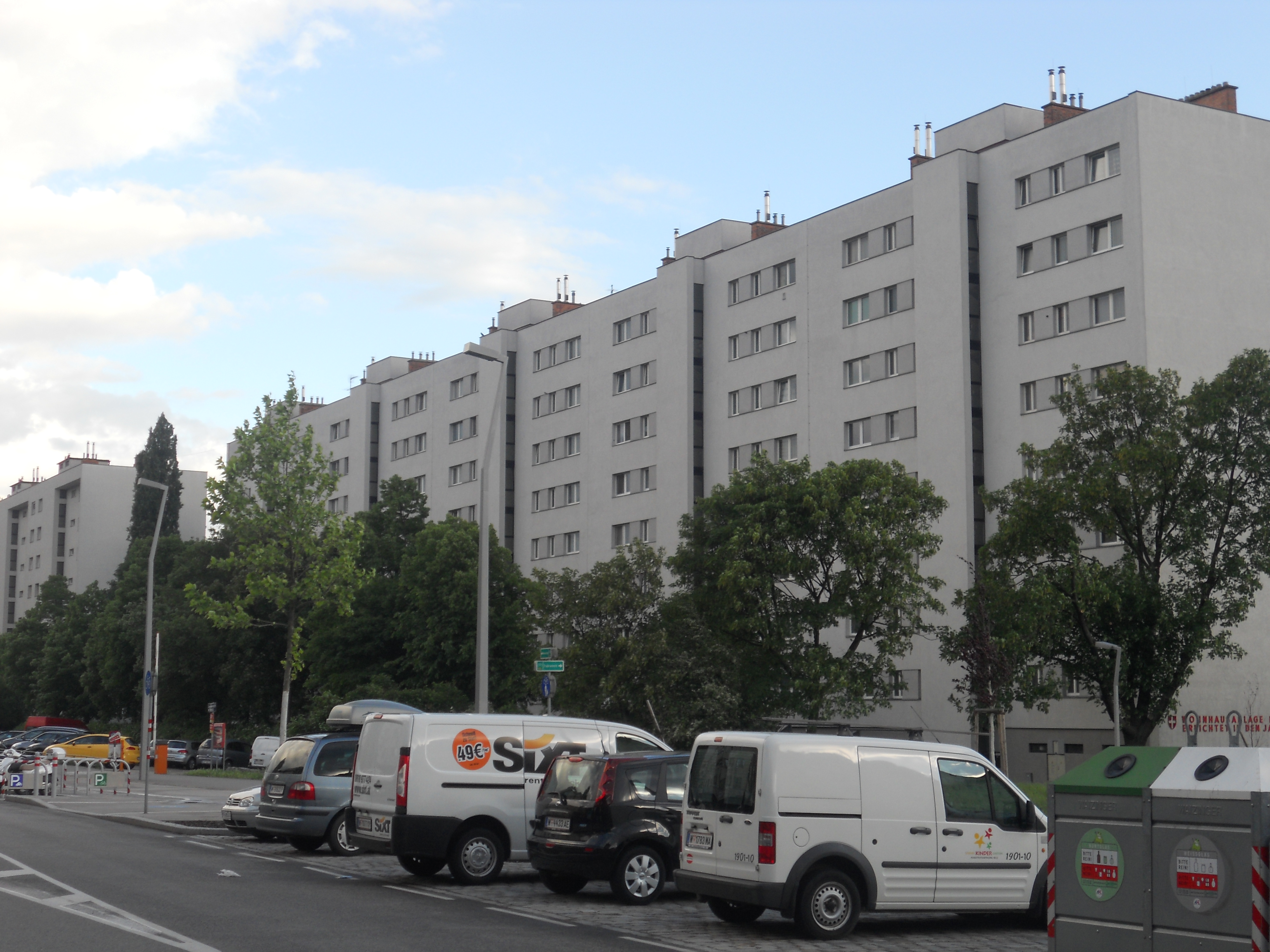 Städtische Wohnhausanlage Engerthstraße 232-238 in Wien; seit 9. September 2017 trägt sie den Namen Eveline-Andrlik-Hof, benannt nach der Kommunalpolitikerin Eveline Andrlik